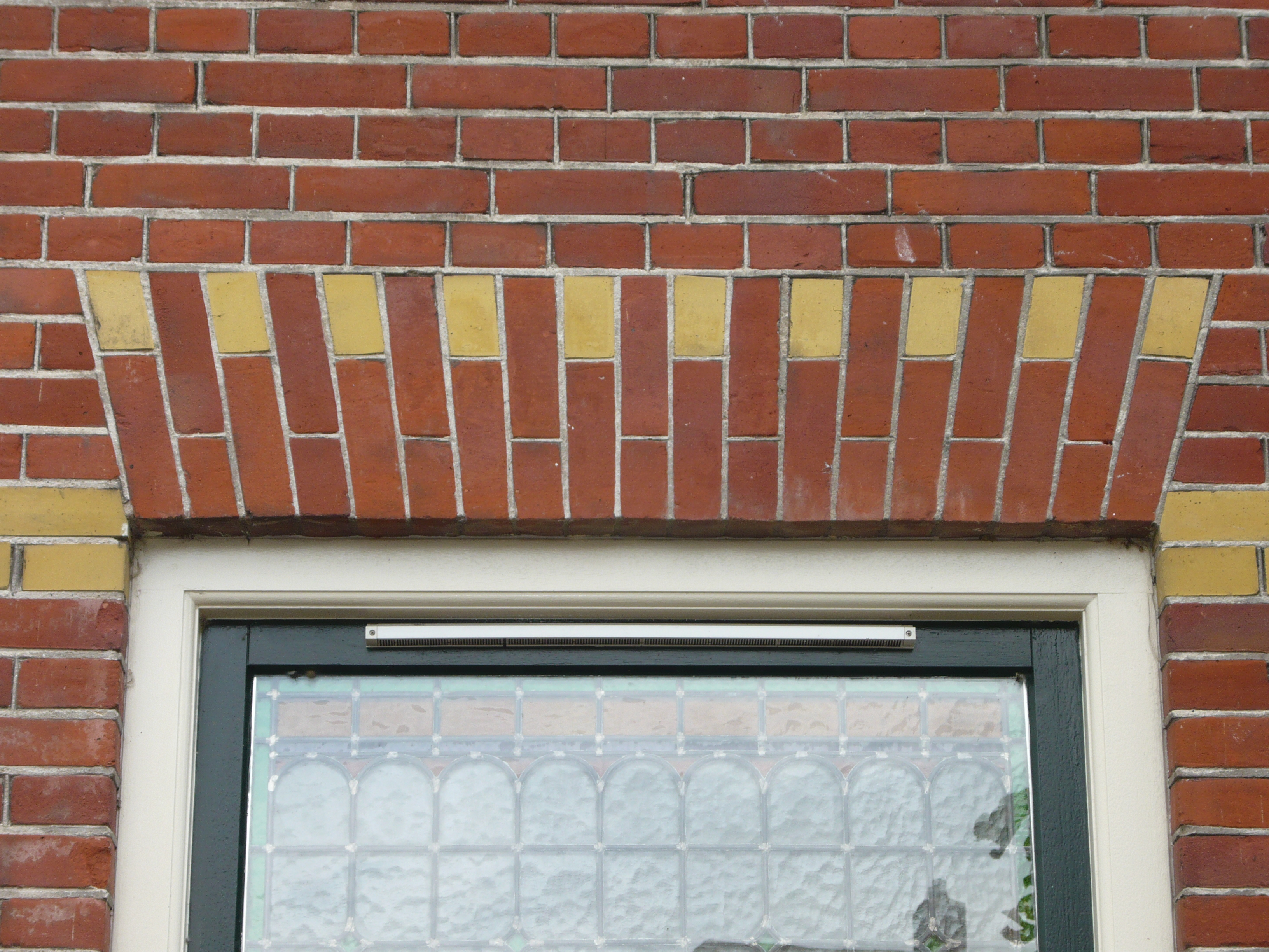 Strek: wigvormige rollaag boven muuropening